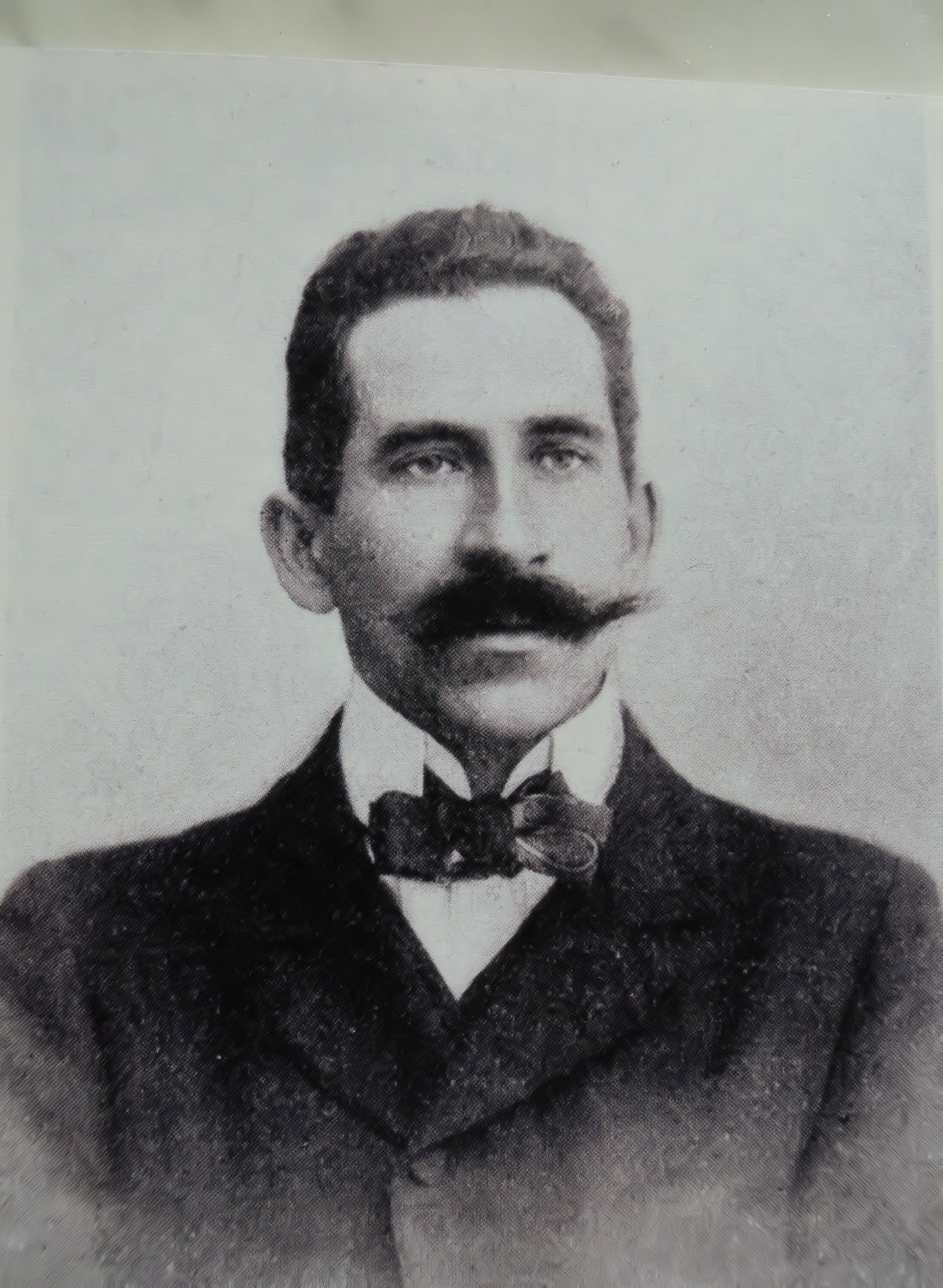 Tadeusz Popiel - zdjęcie nieznanego autora